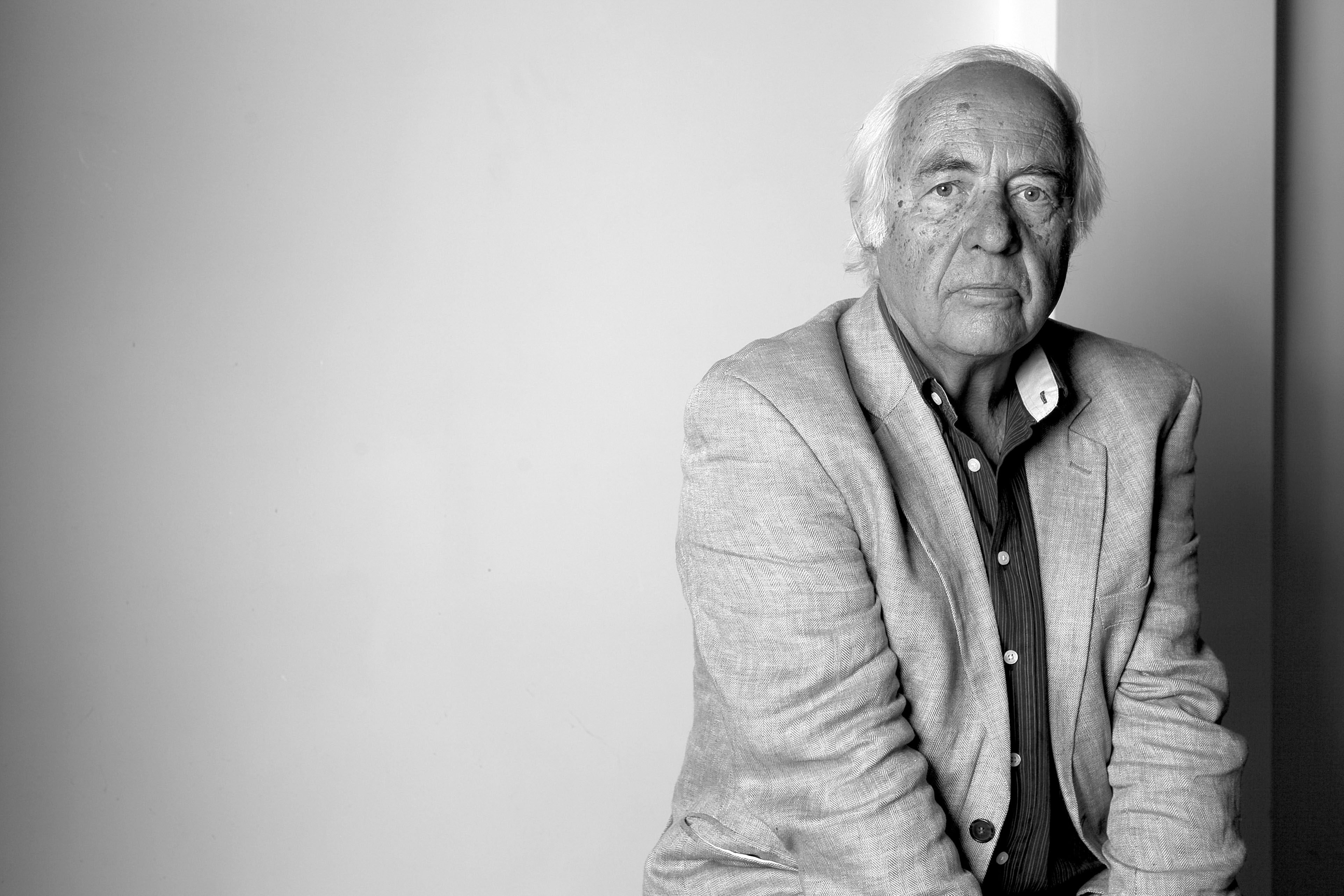 Wim Hazeu (2011)